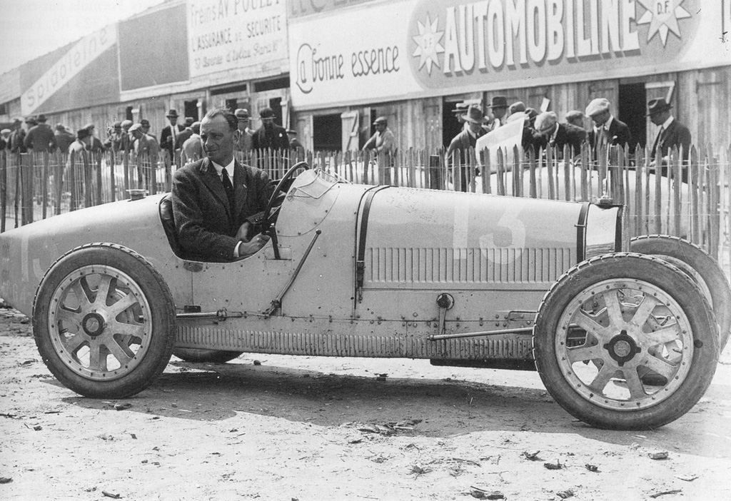 L'italien Meo Costantini (pilote puis directeur de course Bugatti) au volant d'une Bugatti Type 35 lors du GP de l'ACF 1924 à Lyon